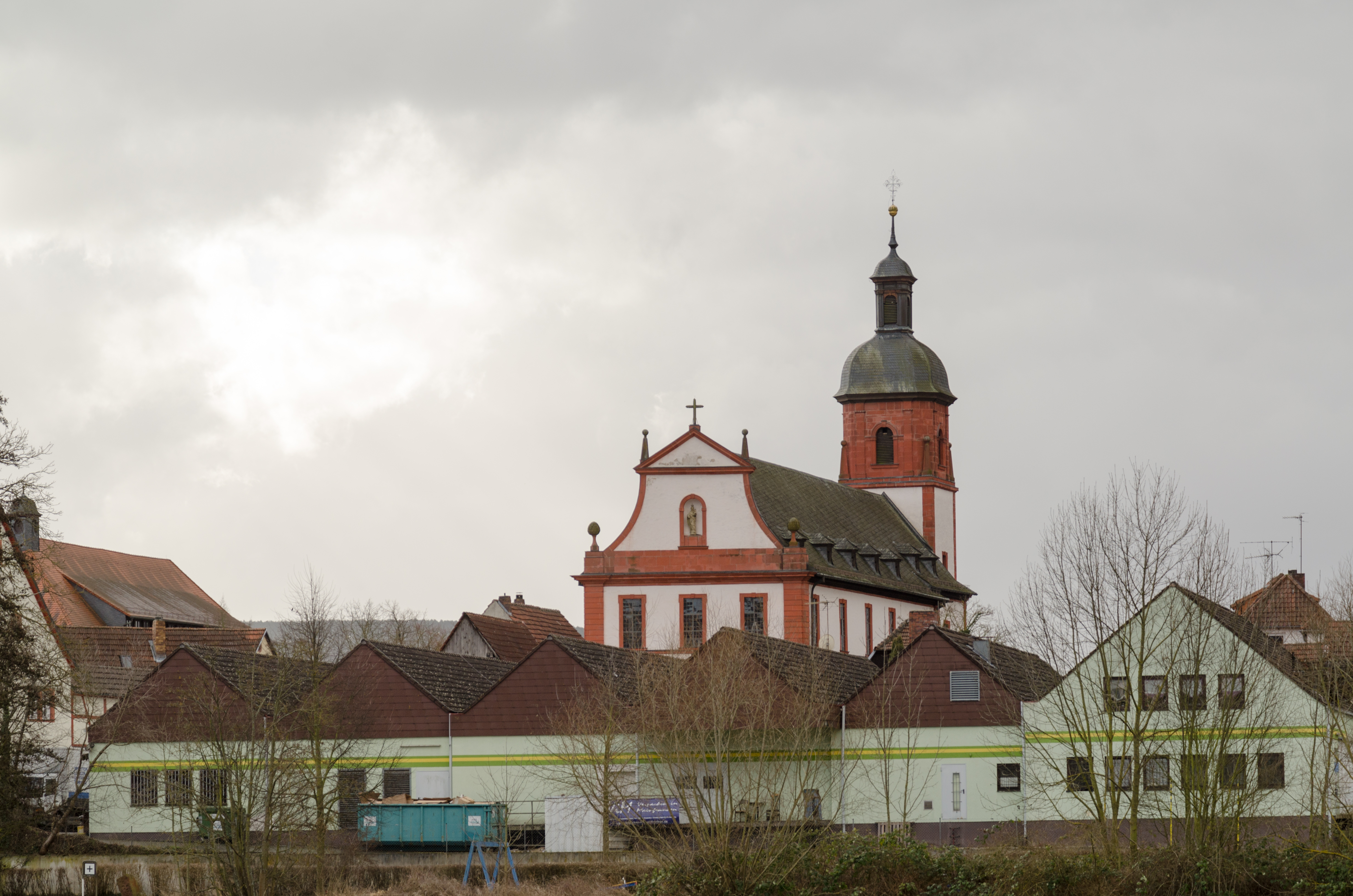 Zellingen, Kath. Pfarrkirche St. Georg